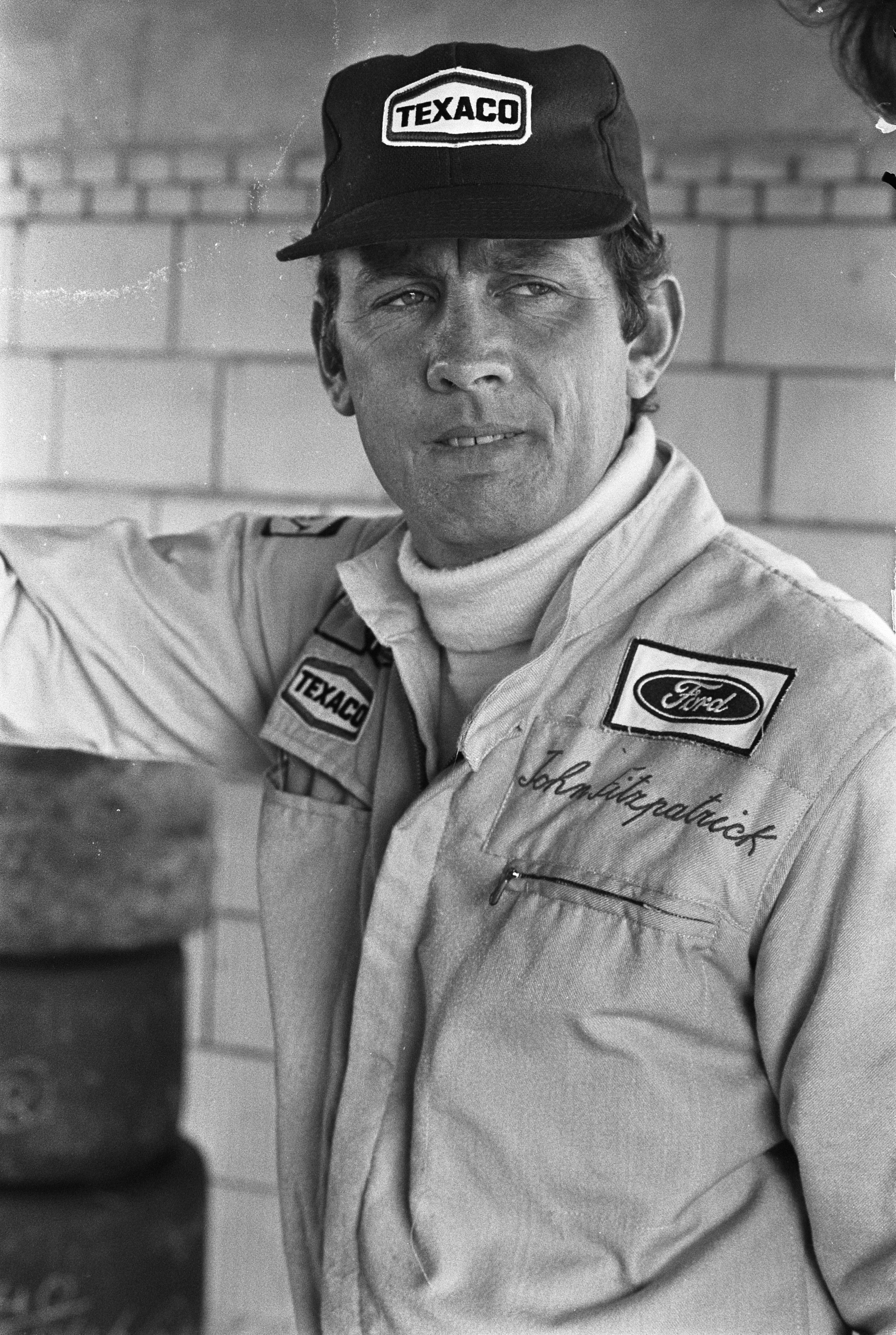 Collectie / Archief : Fotocollectie Anefo Reportage / Serie : [ onbekend ] Beschrijving : Zandvoort Trophy toerwagens, groep II, John Fitzpatrick (kop) Datum : 12 augustus 1973 Locatie : Noord-Holland, Zandvoort Trefwoorden : autoraces Fotograaf : Punt, […] / Anefo Auteursrechthebbende : Nationaal Archief Materiaalsoort : Negatief (zwart/wit) Nummer archiefinventaris : bekijk toegang 2.24.01.05 Bestanddeelnummer : 926-6028